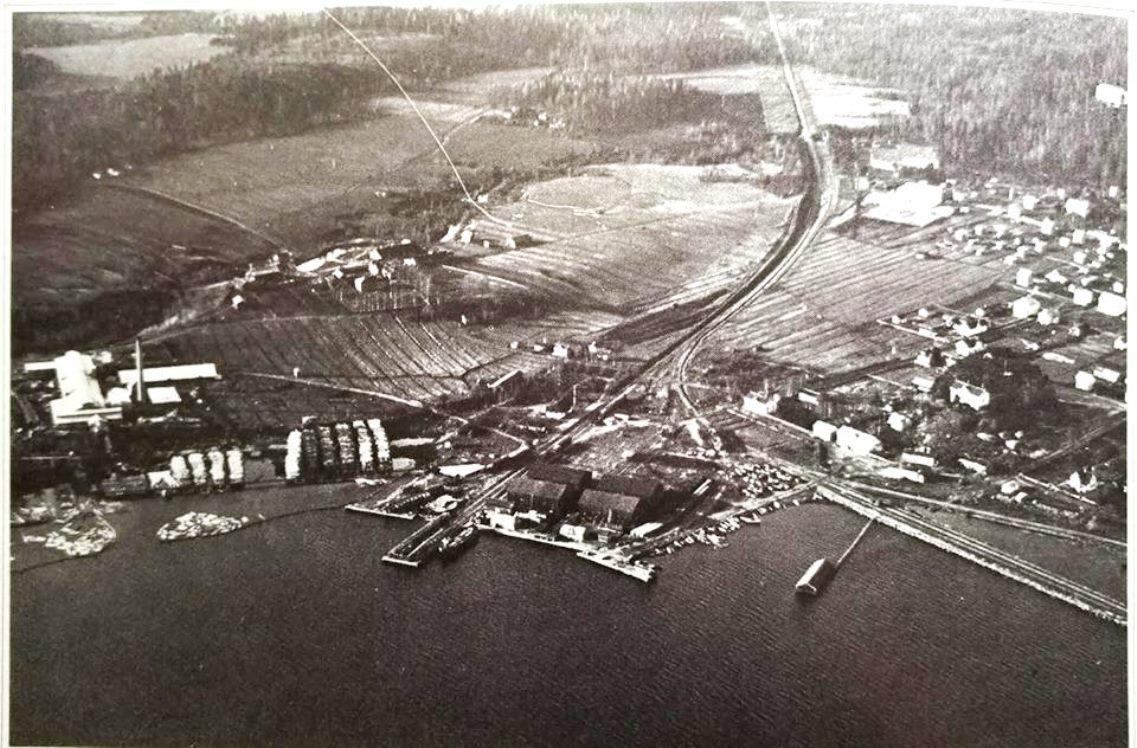 Ст. Лахденпохья.